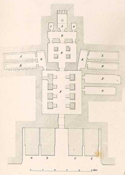 Tempelplan Abu-Simbel